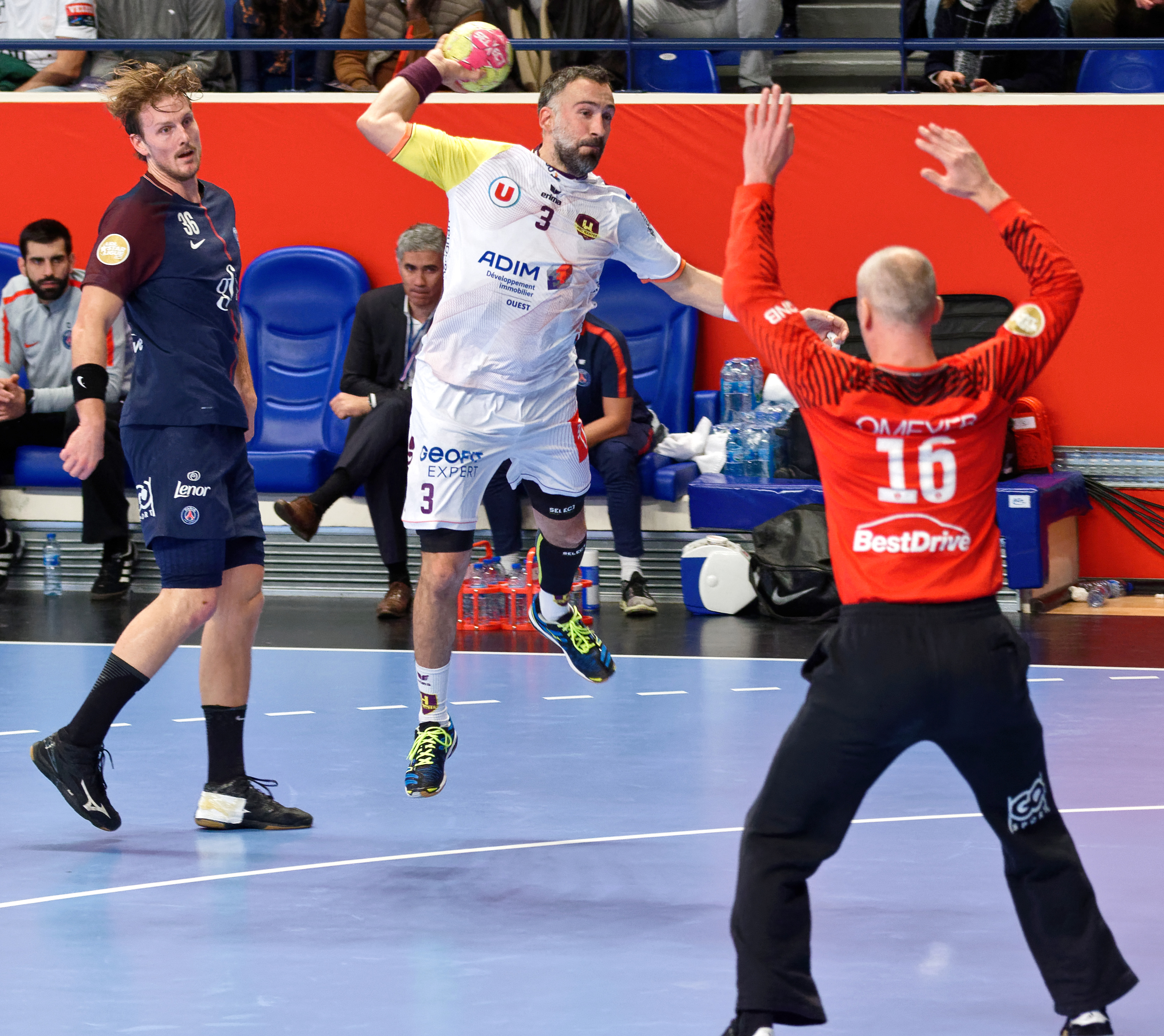 Quart de finale de la Coupe de la Ligue entre le PSG et le HBC Nantes. A Coubertin, le 14 décembre 2017.